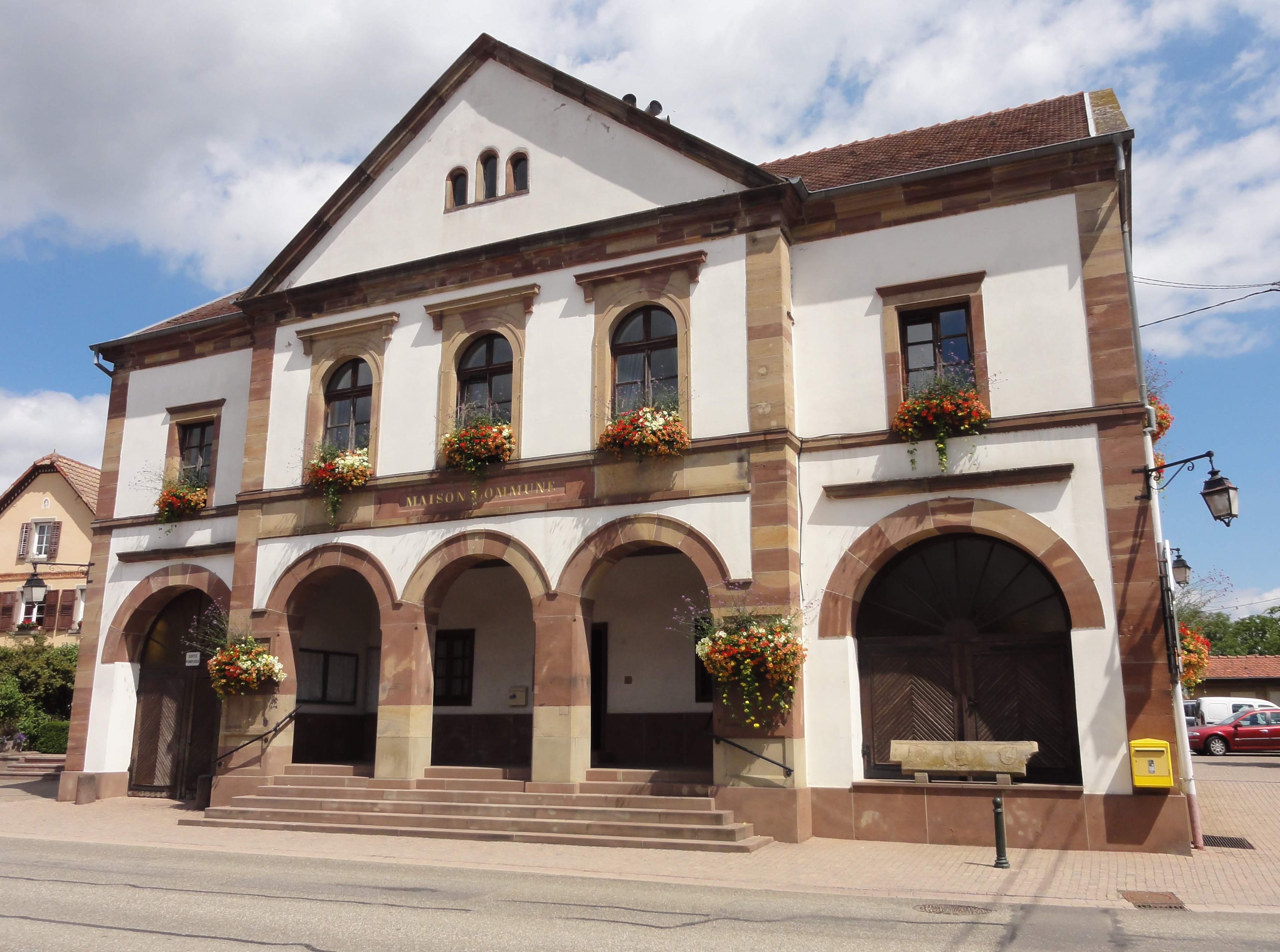 Alsace, Bas-Rhin, Valff, Mairie (1843). .